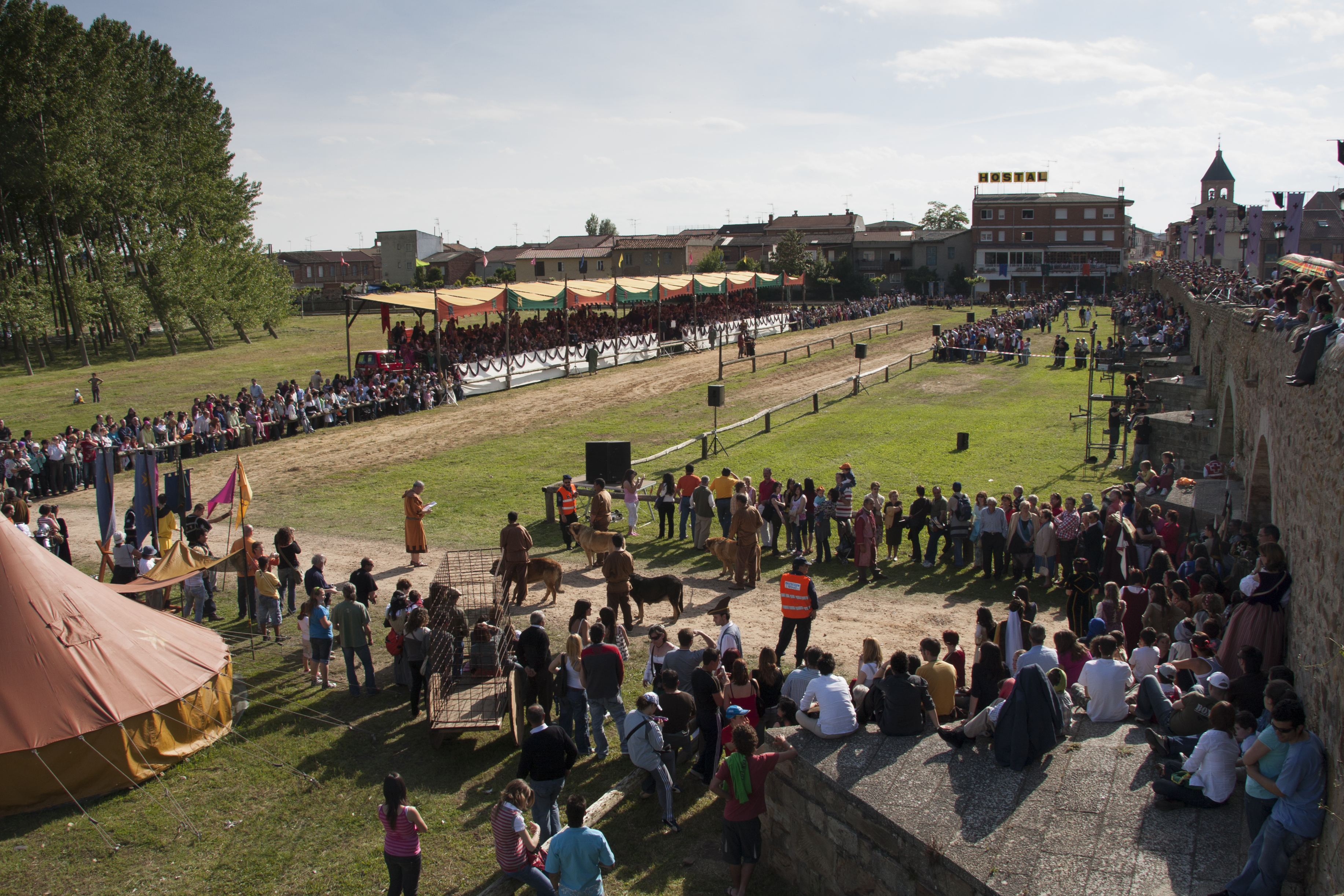 Justas Medievales del Paso Honroso. Hospital de Órbigo, León, España. Junio de 2008. This is a photography of a Folklore festival in Spain (Wikidata id Q23657694).